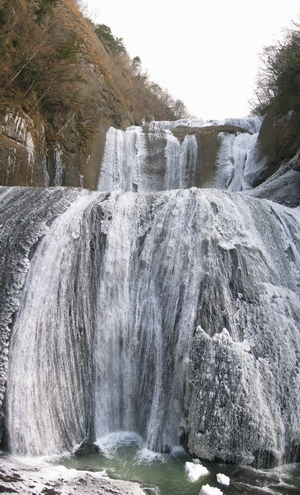 Fukuroda Falls, Sagamihara, Kanagawa, Japan